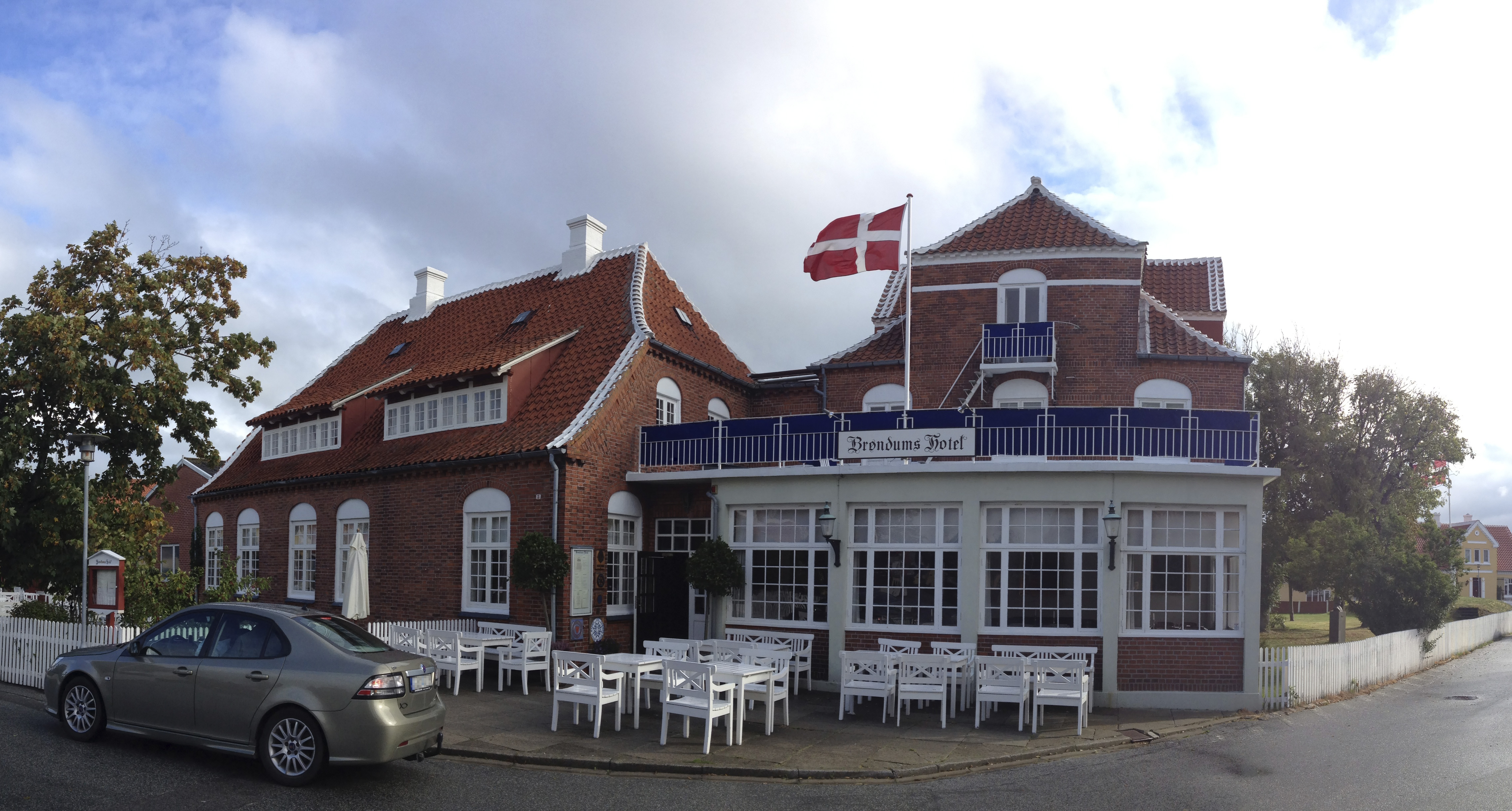 Fotografi på Brøndums hotells exteriör i Skagen, Danmark.